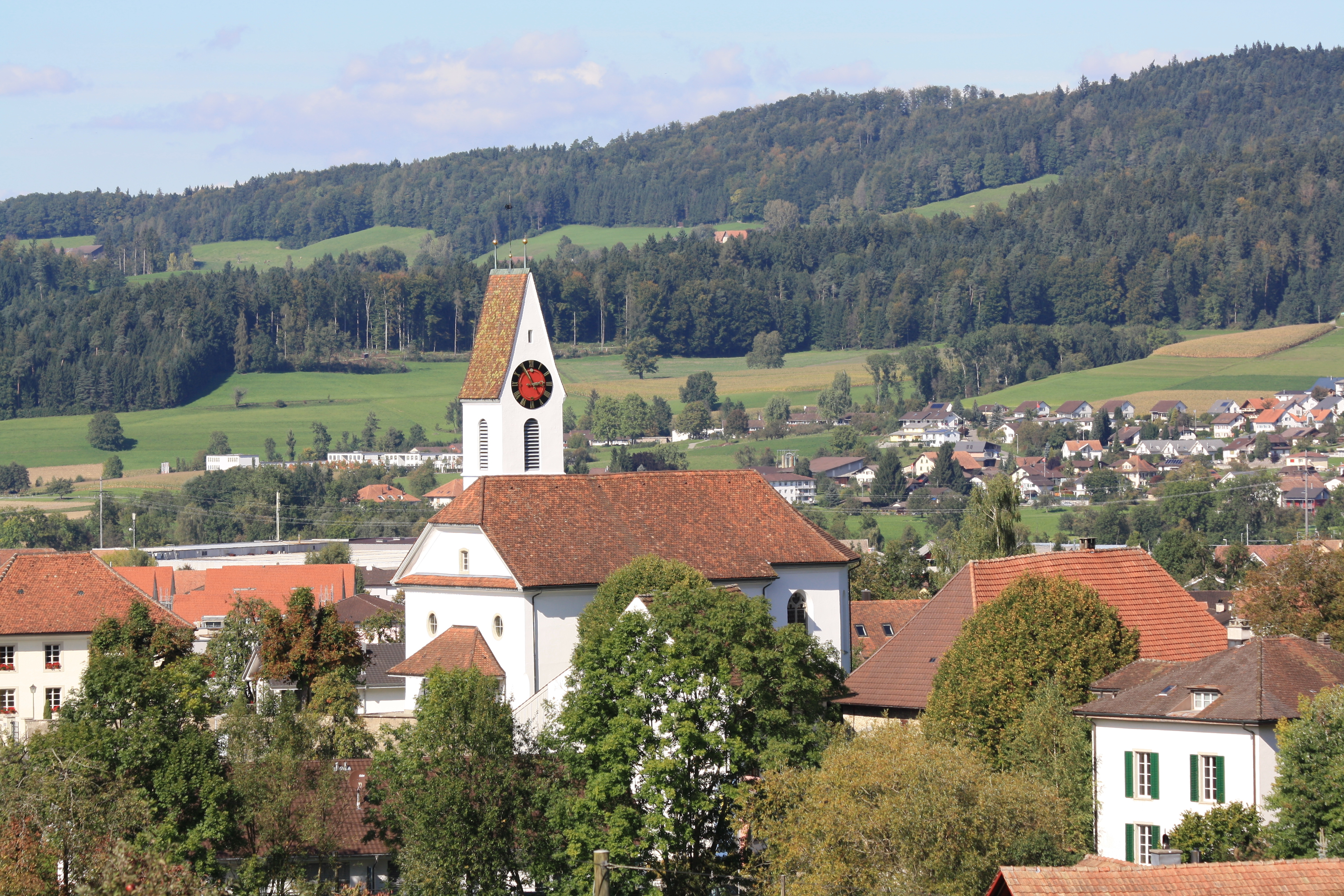 Gontenschwil